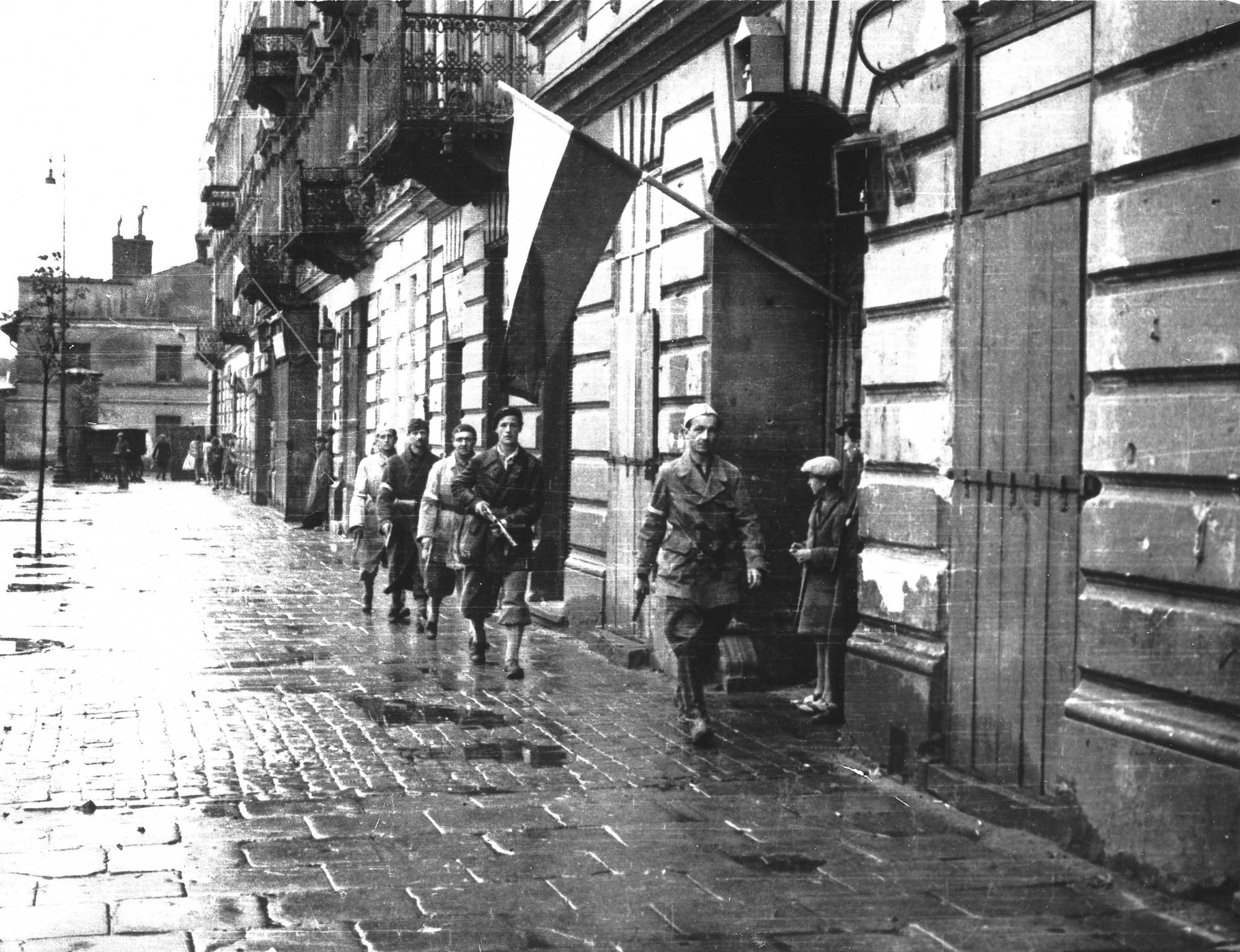 Początek sierpnia 1944. Patrol porucznika Stanisława Jankowskiego "Agatona" z batalionu "Pięść" na pl. Kazimierza Wielkiego w drodze do Śródmieścia. Od prawej kolejno kamienice: pl. Kazimierza Wielkiego 8, 10 i 12, w tle po lewej budynek na posesji Wronia 3. Idą od prawej: Stanisław Jankowski ps. Agaton, Witold Abrożewicz ps. Witek, Kazimierz M. Piechotka ps. Jacek, Leon Putowski ps. Pakulski i Wojciech Bernatowicz ps. Marek. Opis sytuacji, w jakiej wykonano zdjęcie, znajduje się w książce: S. Jankowski „Agaton”, Z fałszywym ausweisem... Tom 2, s. 231. Nazwiska osób: na podstawie podpisu pod fotografią między s. 224 i 225. Uwaga, z treści książki S. Jankowskiego wynika, że fotografia została wykonana po 1 sierpnia 1944